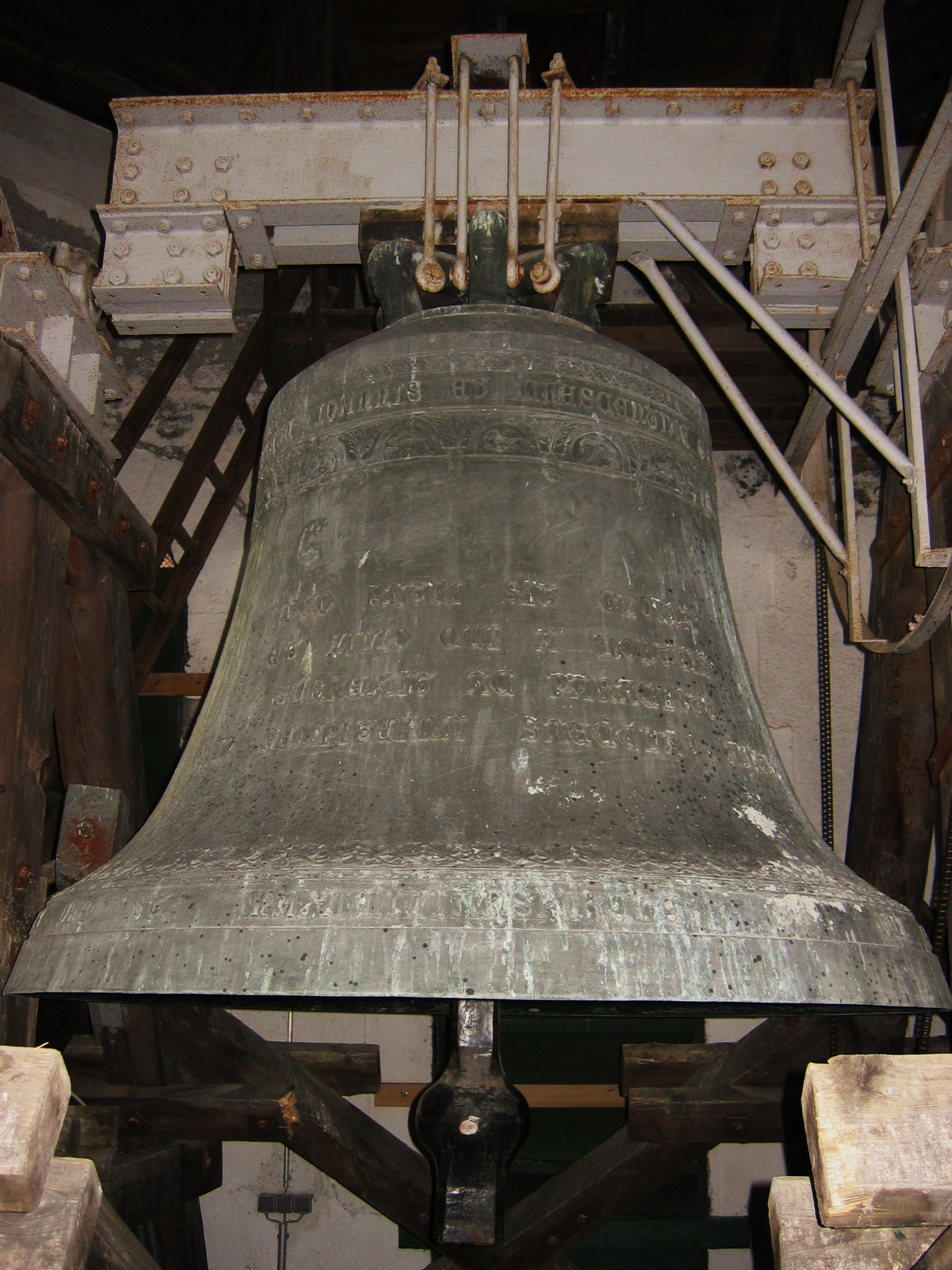 Dreifaltigkeitsglocke (a0) an St. Maximilian in München.